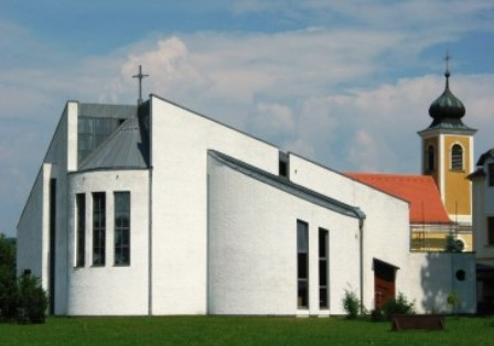 Pfarrkirche St.Altmann im Hellerhof Paudorf (Westansicht)